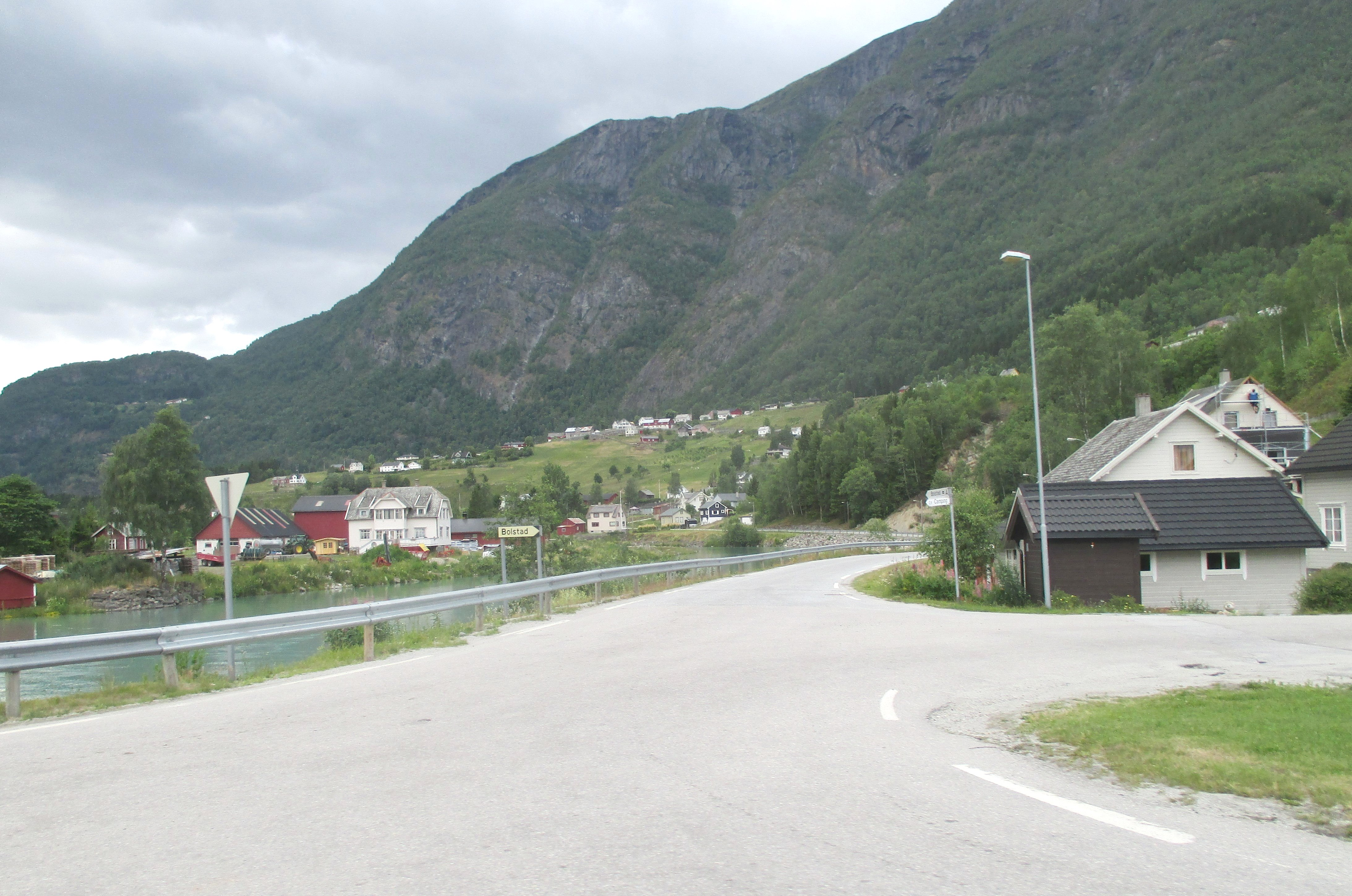 Fylkesvei 333 tar av fra fylkesvei 55 i Skjolden i Luster.